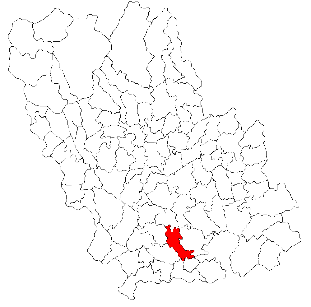 Categorie:Hărţi ale judeţului Prahova